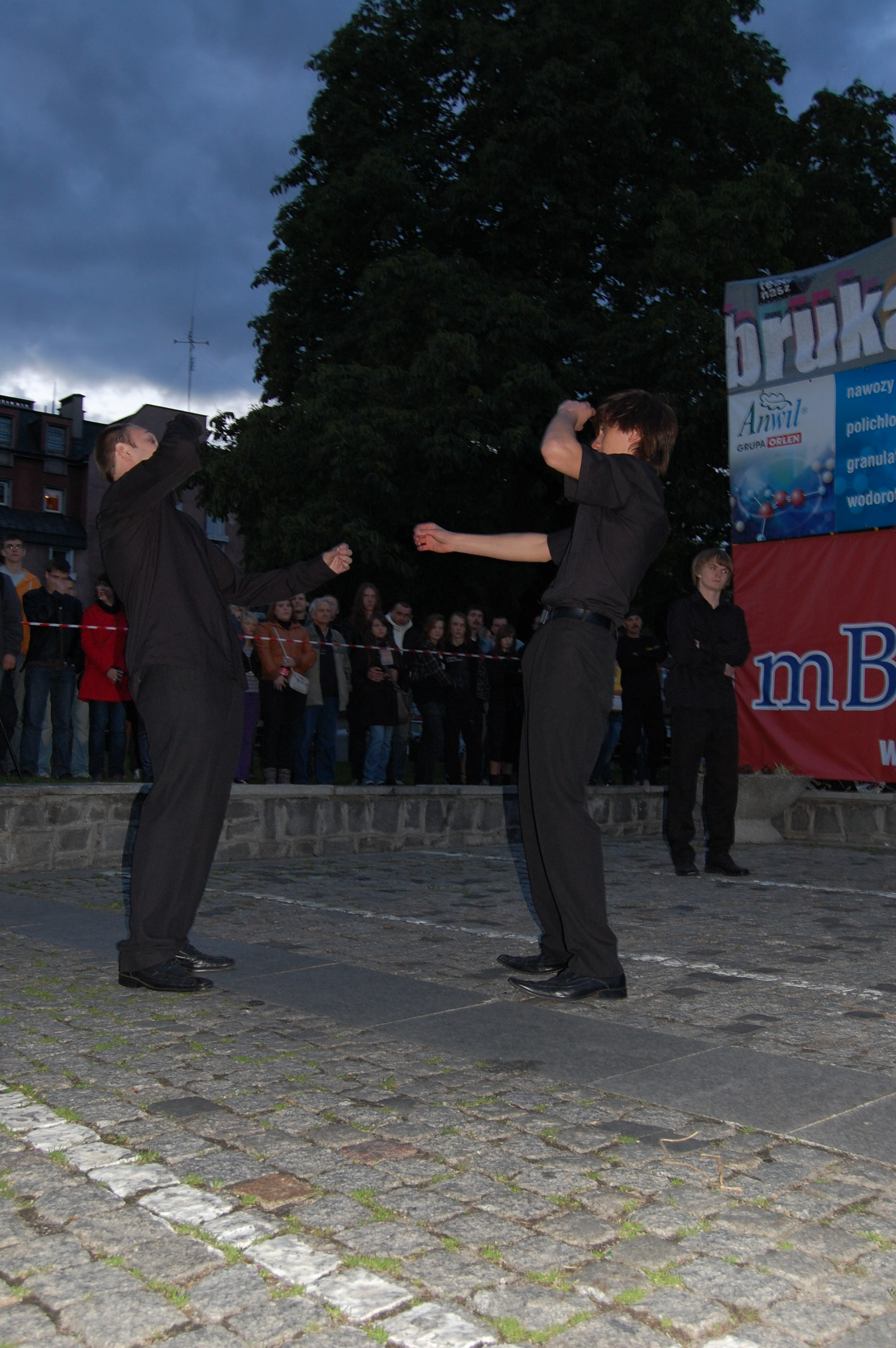 Brukarnia 2009 Wilk stepowy